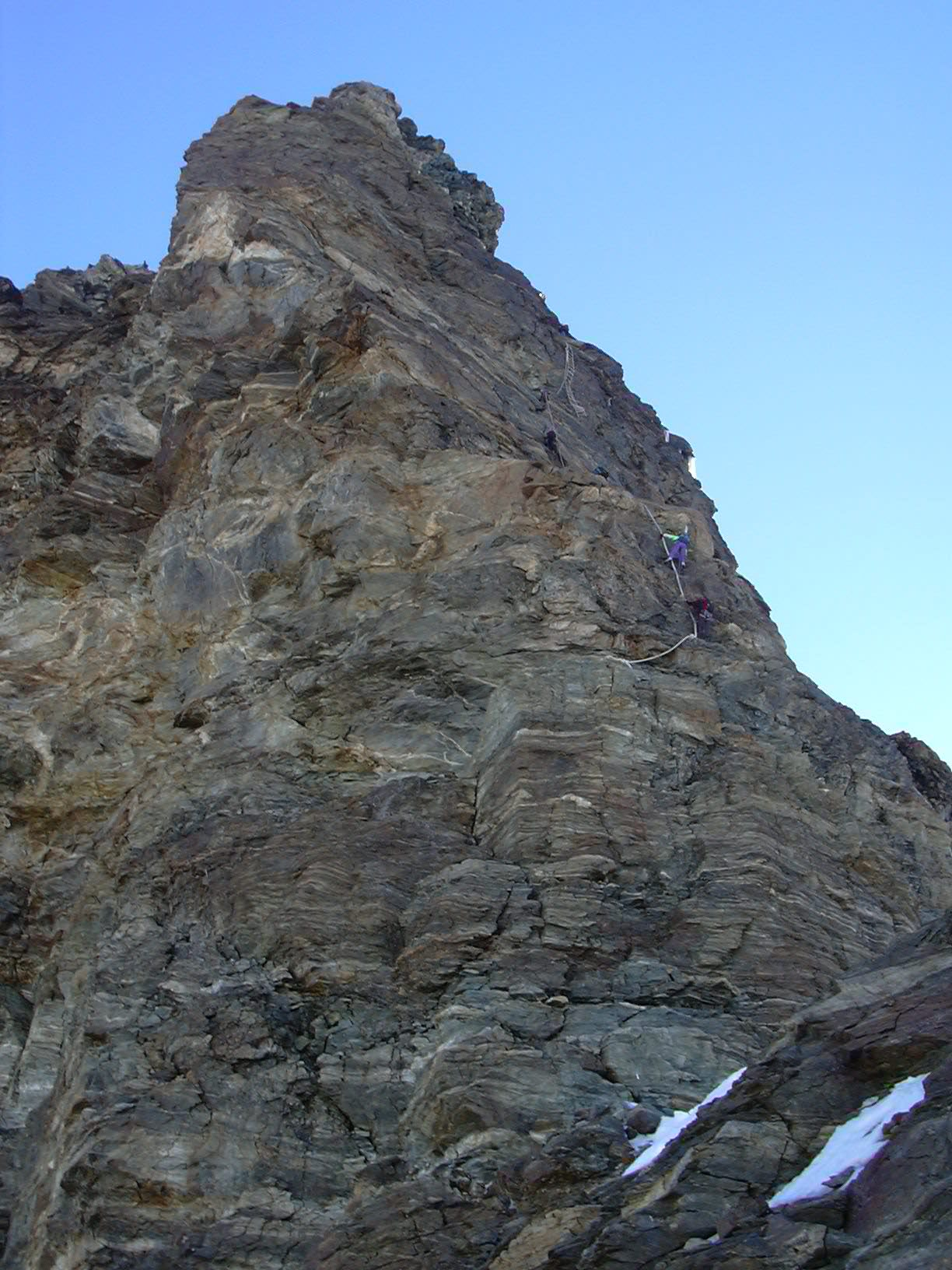 La testa del Cervino